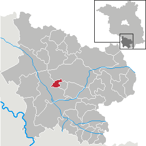 Schilda in Brandenburg (Country) - District Elbe-Elster